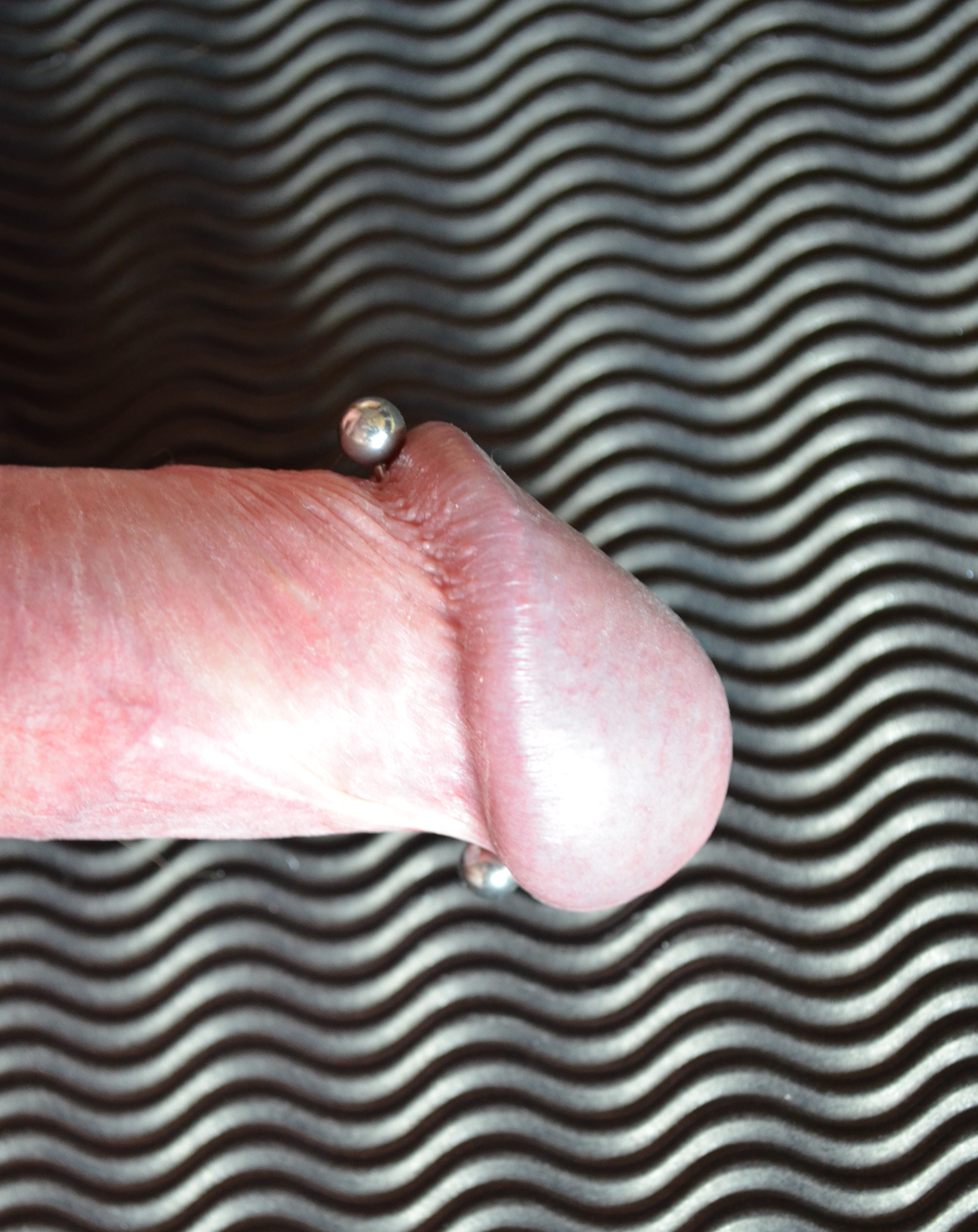 Schaft-Apadravya